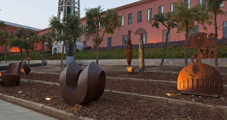 El Museo Can Mario es el Museo de Escultura Contemporánea de la Fundación Vila Casas en Palafrugell (Girona), inaugurado en el año 2004. Acoge alrededor de 220 esculturas que datan desde los años 60 hasta la actualidad y que pertenecen a varios artistas nacidos o residentes en Cataluña.